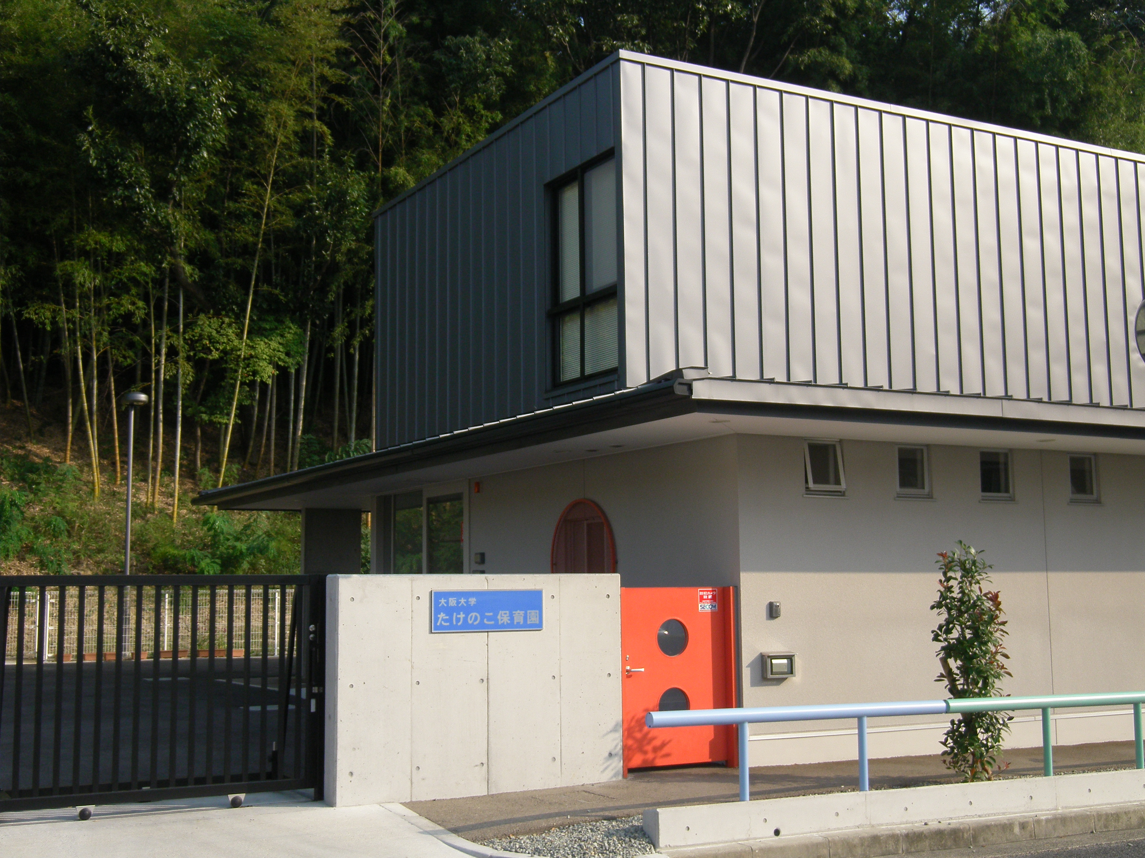 大阪大学吹田キャンパス内、たけのこ保育園。 2008年9月23日に投稿者が撮影。